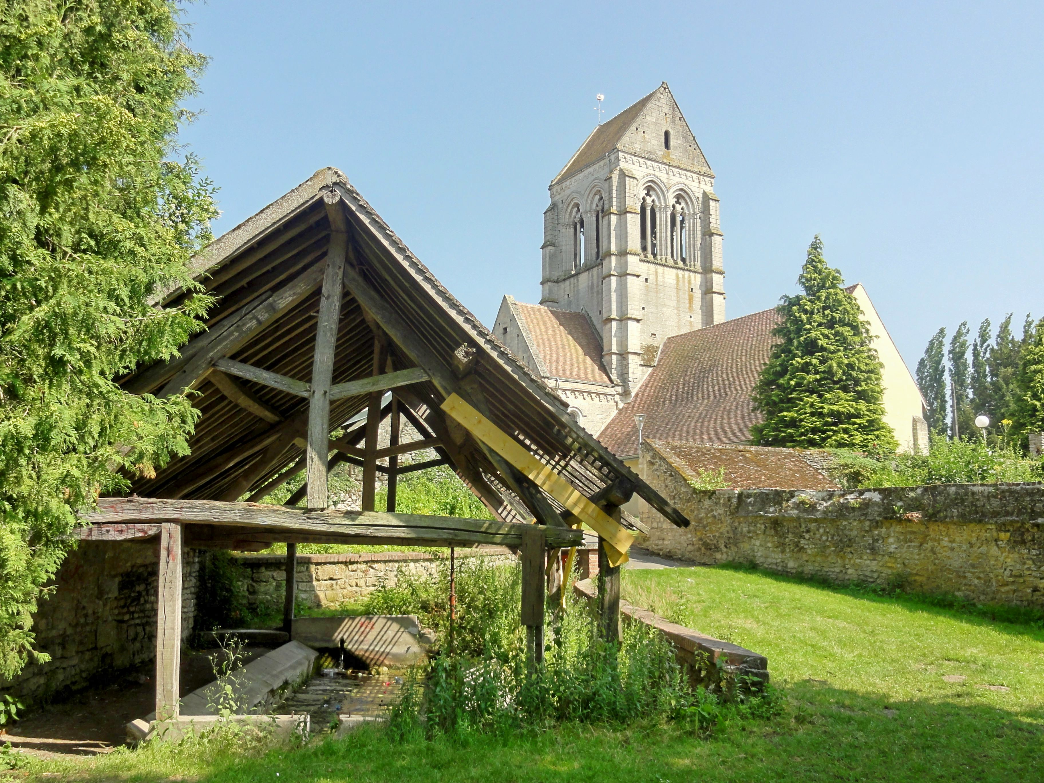 Église et lavoir ruiné.